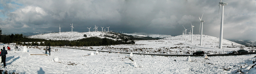 Una gran nevada en la sierra de Faladoira